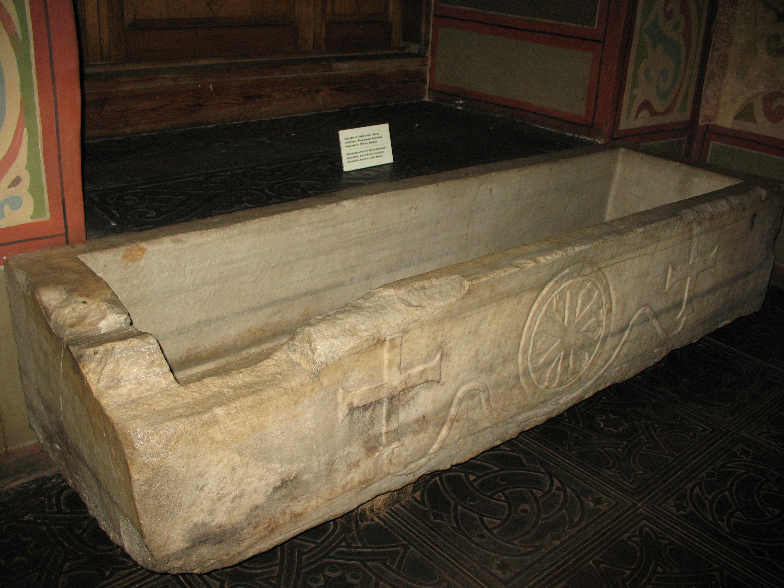 Саркофаг із Софійського собору (вірогідно київського князя Володимира Мономаха)